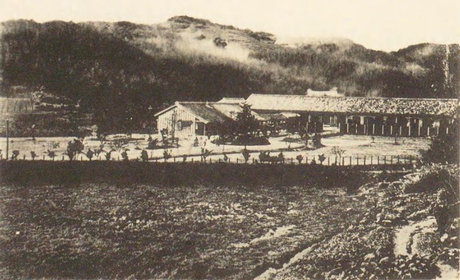 日治時期基隆的傳染病醫院